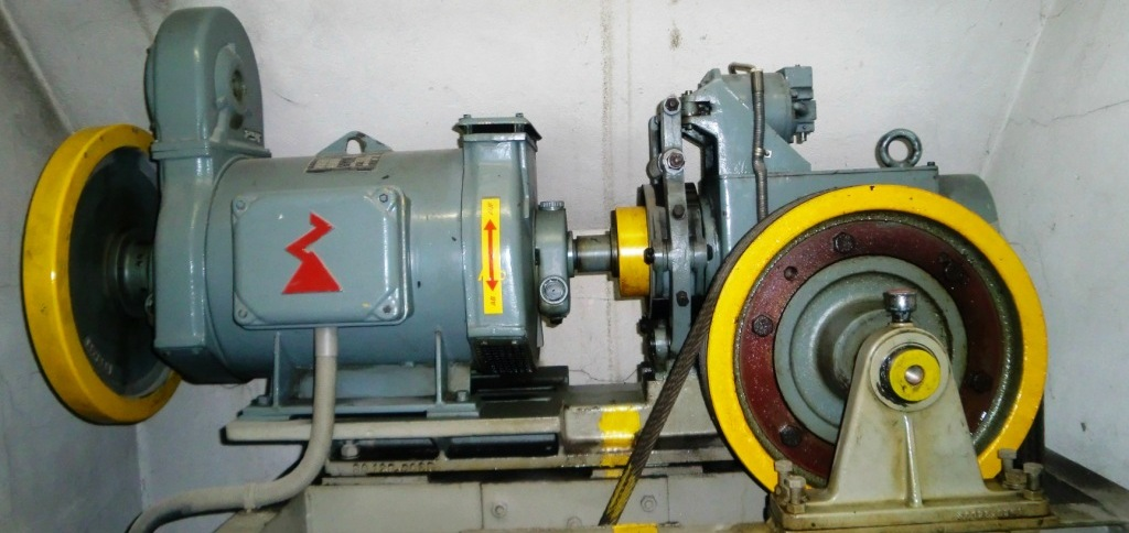 Alte Aufzugsmaschine mit Getriebe, Motor, Bremse, Kupplung und Treibscheibe